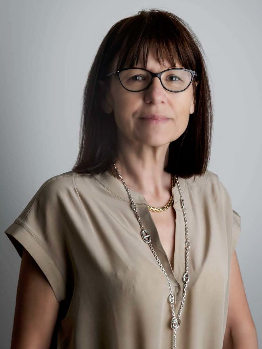 Marie Claire Villeval, économiste française